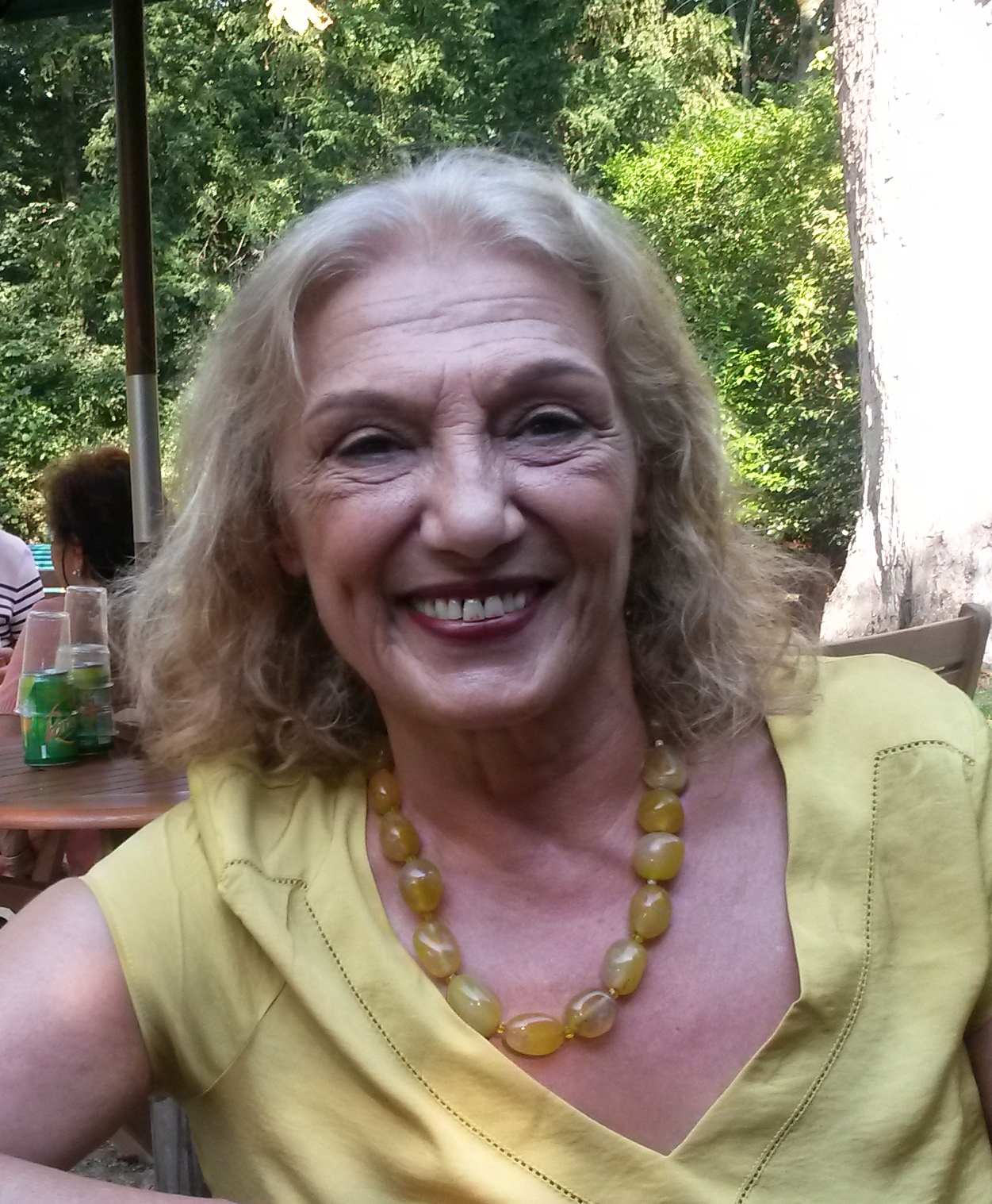 Gemma Salem à l'Orangerie du Parc de Bagatelle en 2015